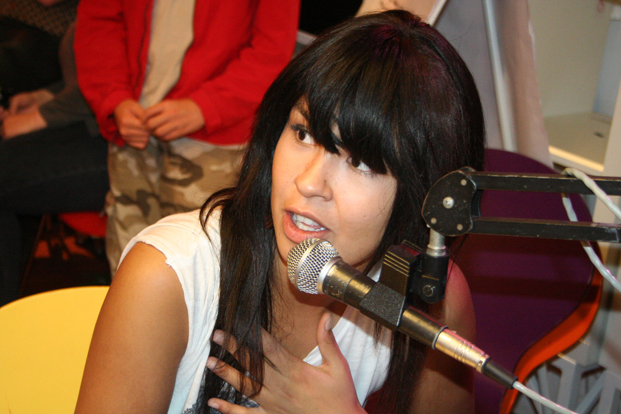 Maria Mena at BNN That's Live